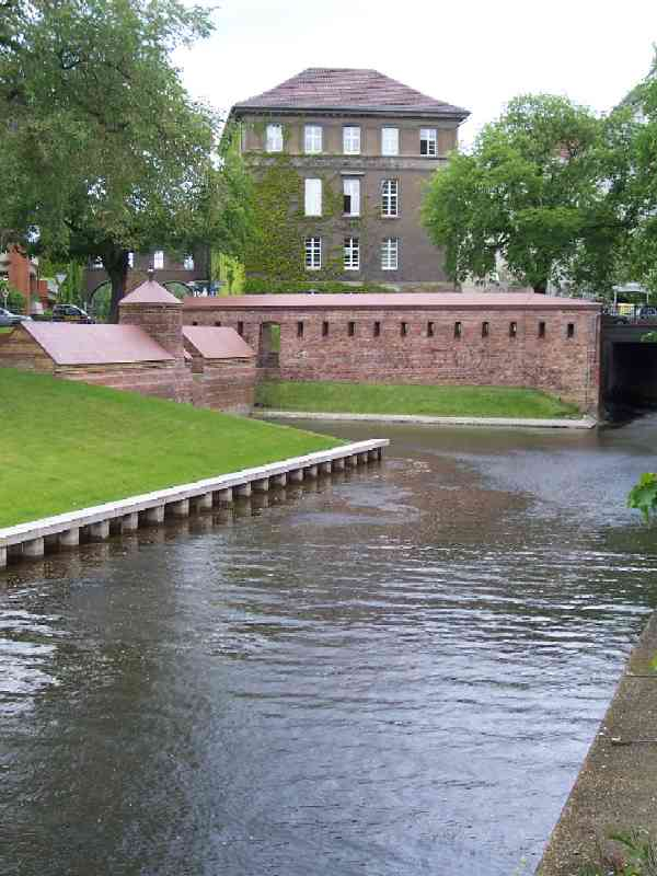 Batardeau in Berlin-Spandau zur Regulierung des Wasserstandes im Festungsgraben, Zustand: Mai 2006